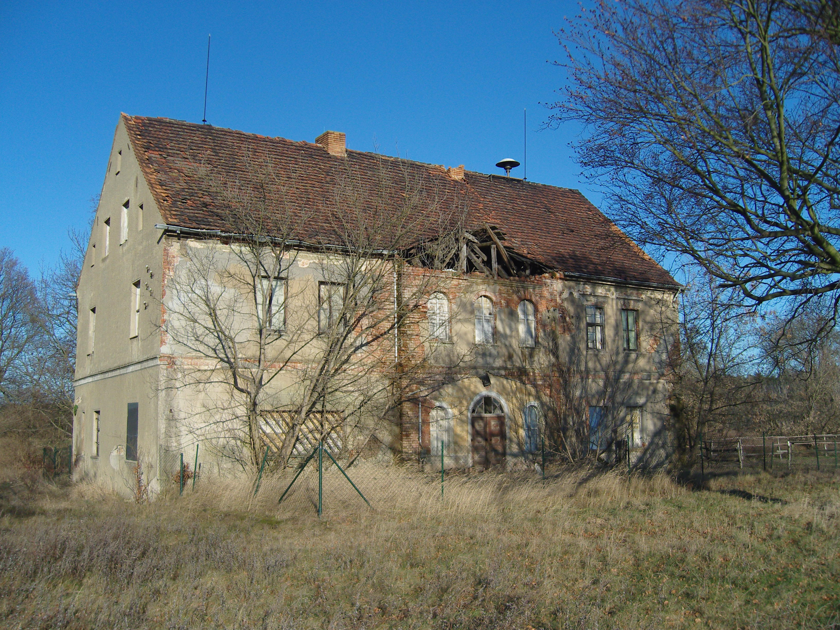 Herrenhaus in Leeskow, Niederlausitz, Baudenkma